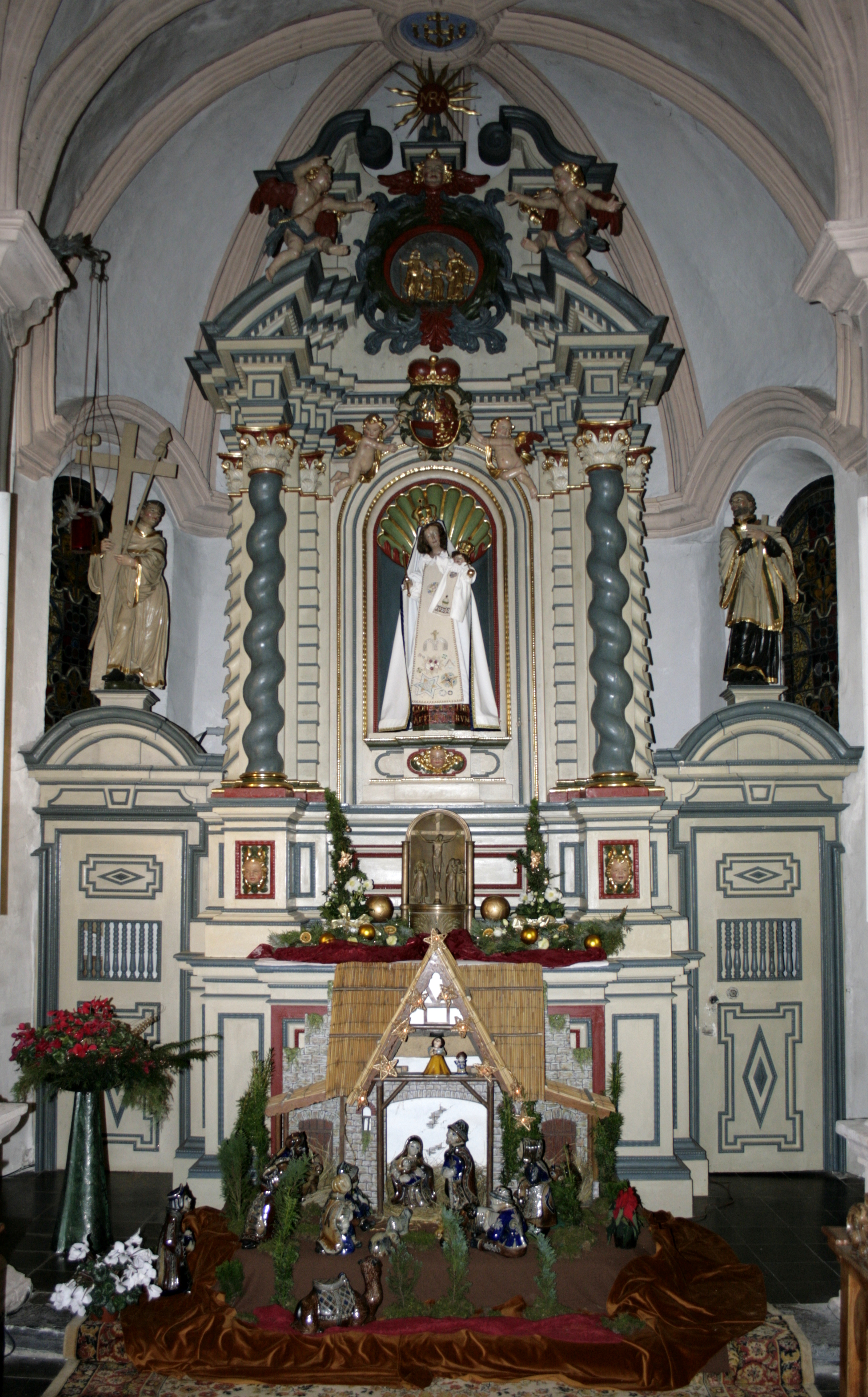 Altar der Herzenbergkapelle in Hadamar, Deutschland